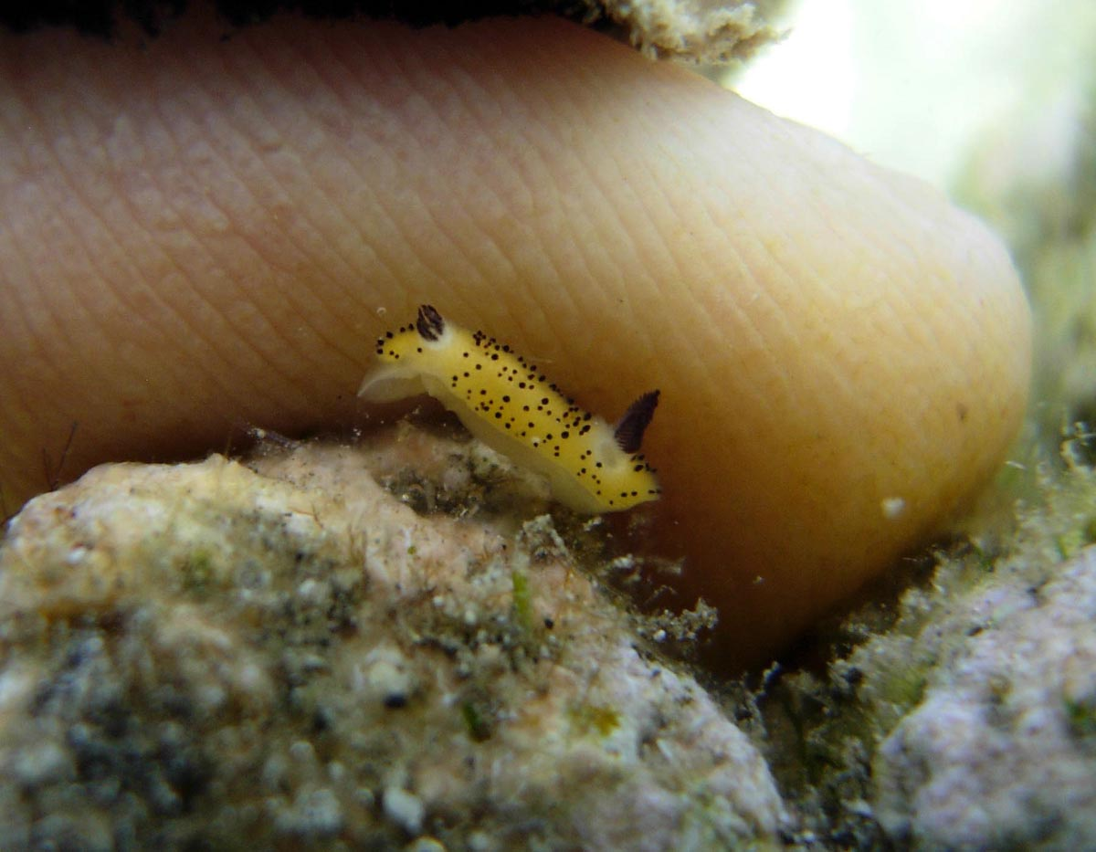 Un Jorunna parva à la Réunion.